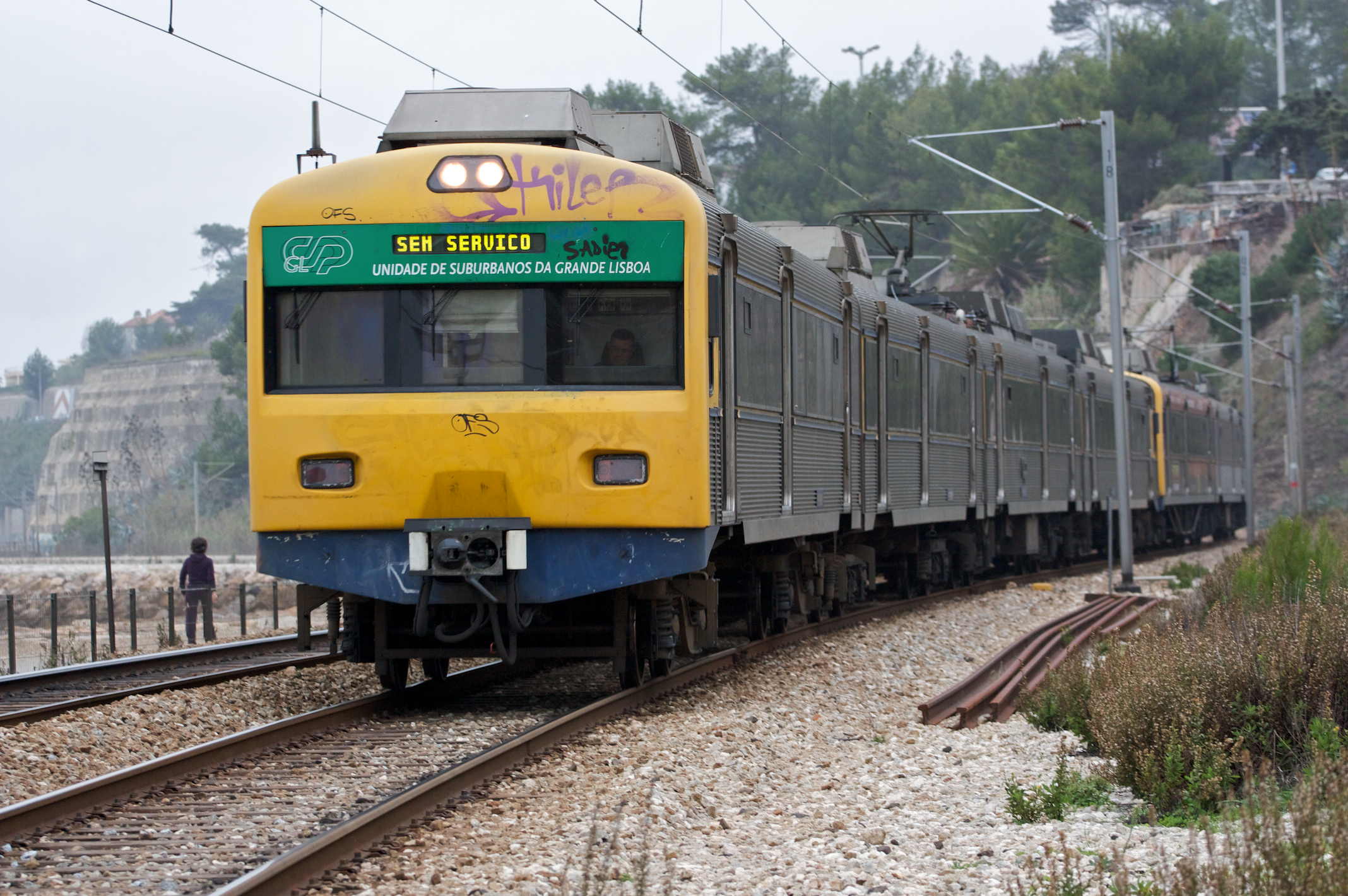 Tipo: Marcha de serviço 27912 [Oeiras - Cais do Sodré] Local: Cruz Quebrada [Linha de Cascais, PK 10] Data e hora: 13 de Novembro de 2009 [17h01] Material: Automotoras 3264 e 3156 [Unidade Quádrupla Eléctrica + Unidade Tripla Eléctrica]